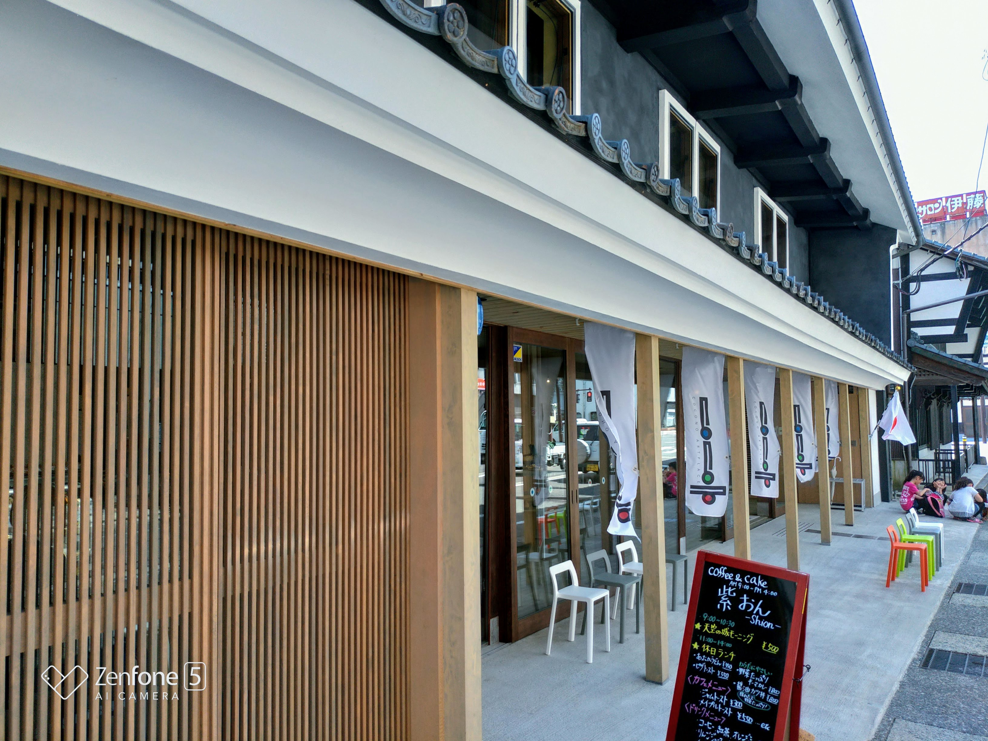 福井県大野市 古民家ギャラリー COCONOアートプレイス